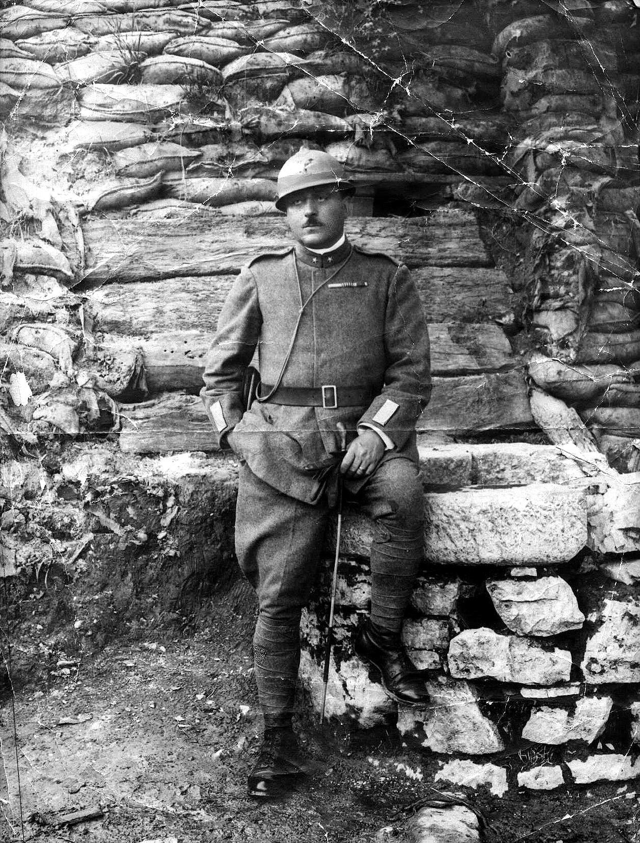 Il Generale Enrico Gotti sul campo di battaglia